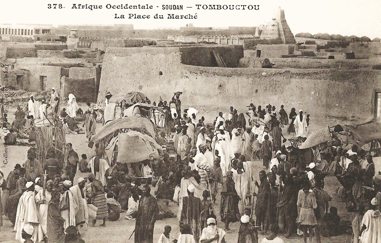 François-Edmond Fortier, Tombouctou. La Place du Marché. Afrique Occidentale - Soudan.